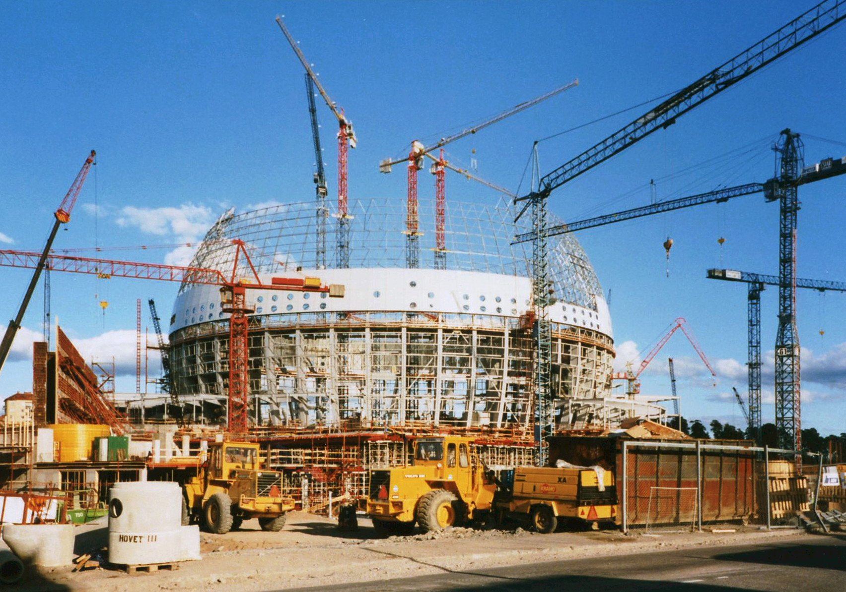 Globen i Stockholm byggs